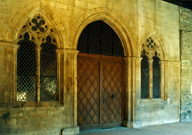 Abadia de Santa Maria d'Arles. Sala capitular. Vallespir, França